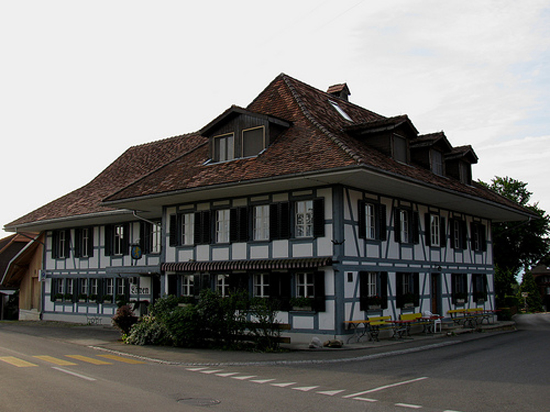 Wirtshaus zum Leuen, Zimmerwald